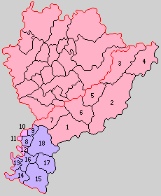 愛知県八名郡の町村制時点の町村。